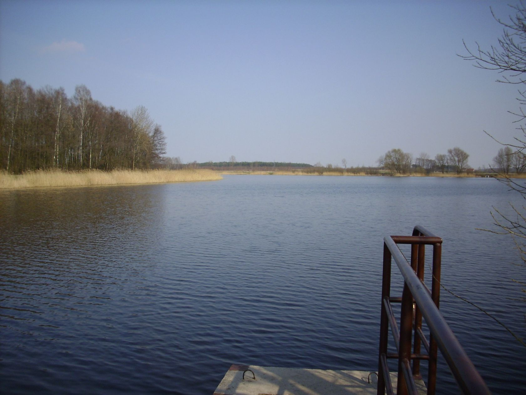 Zalew w Witulinie.